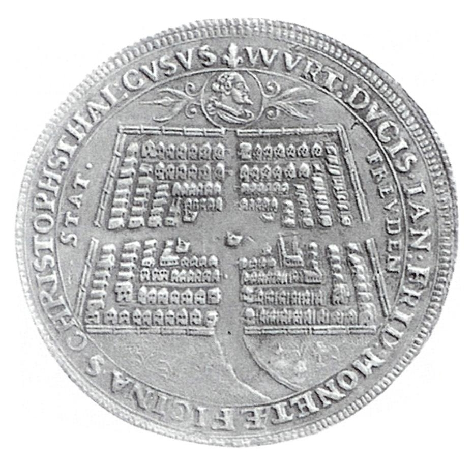 Freudenstädter Geschenktaler (Rückseite)